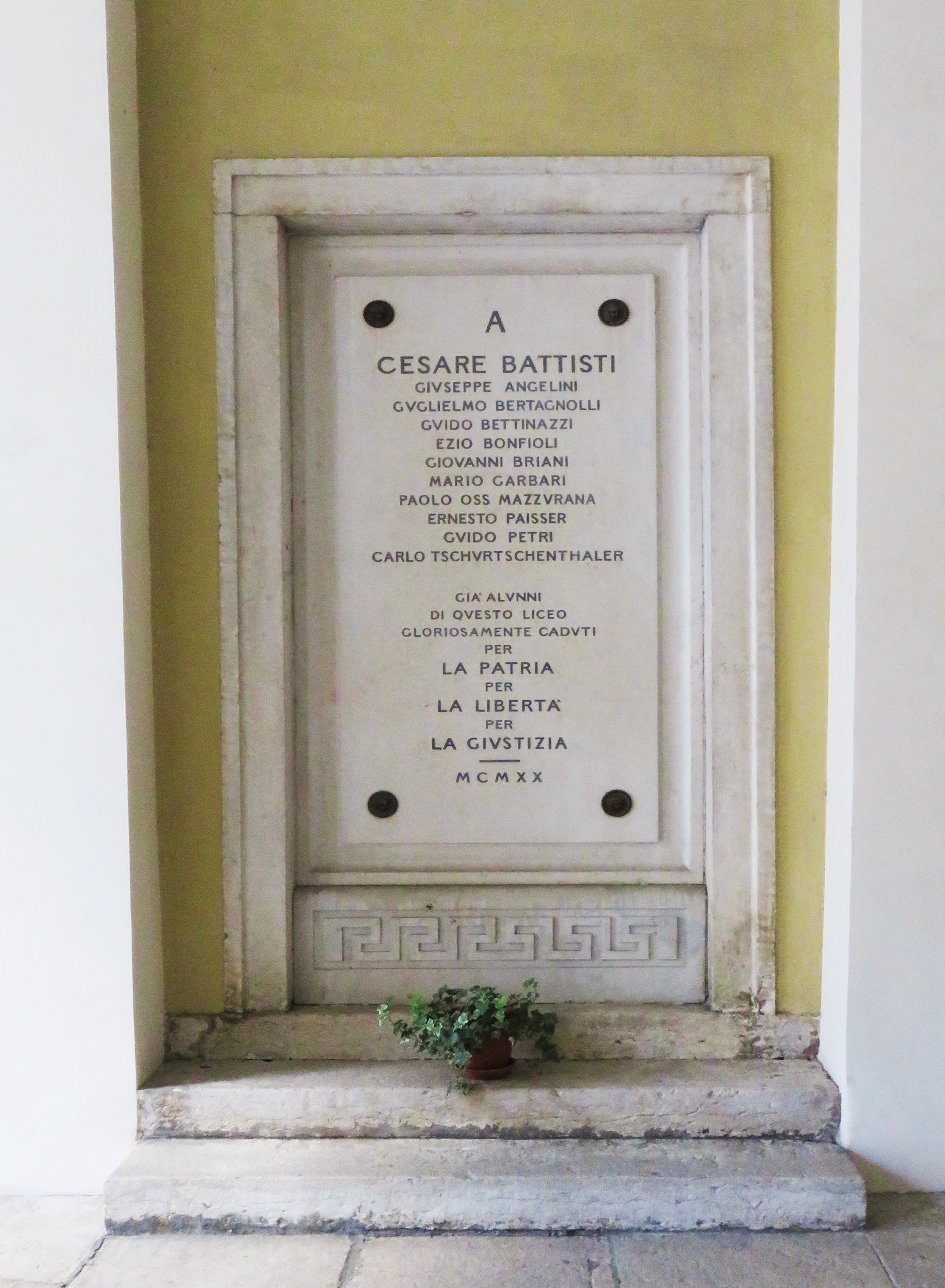 Lapide nell'atrio coperto prima dell'ingresso del Liceo Giovanni Prati di Trento